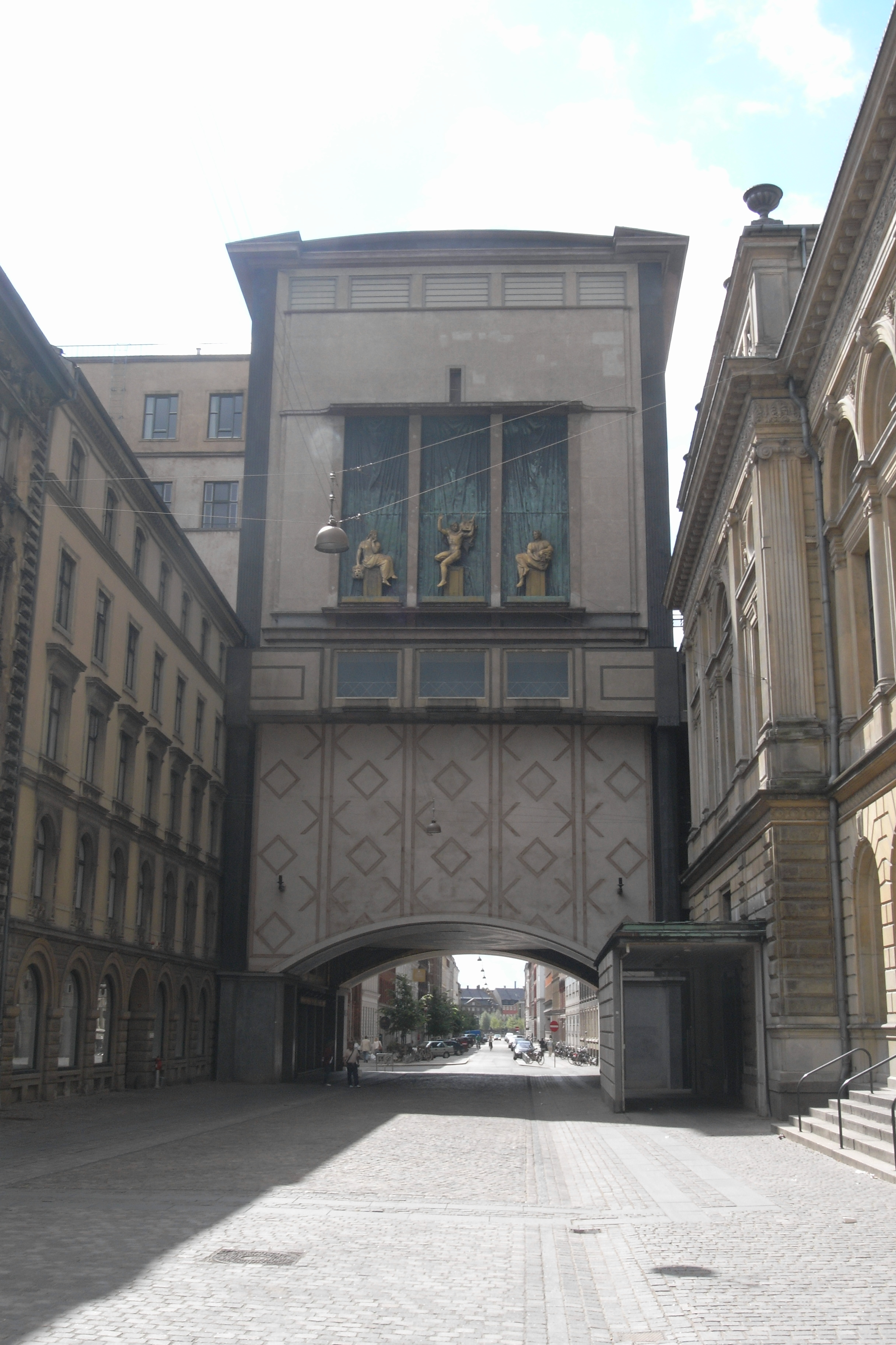 Stærekassen's stage tower in Copenhagen, Denmark